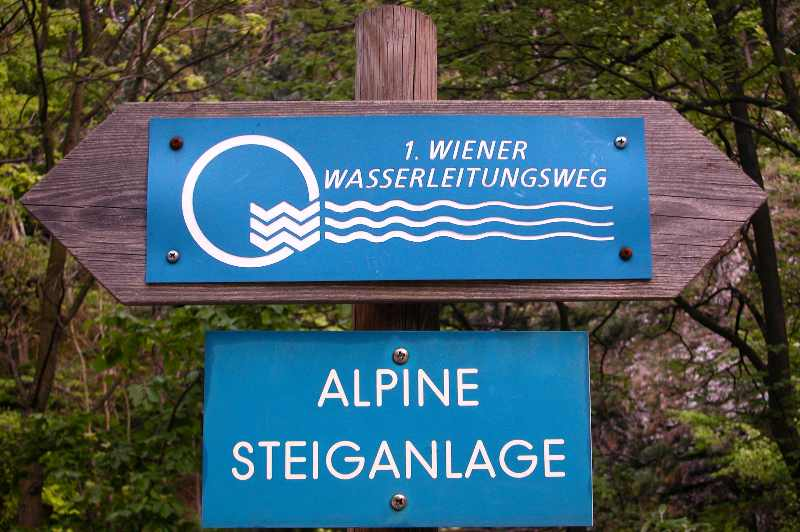 Wegweiser des "1. Wiener Wasserleitungswanderwegs" im Höllental zwischen Hirschwang und Kaiserbrunn in Niederösterreich